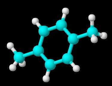 para ksilen